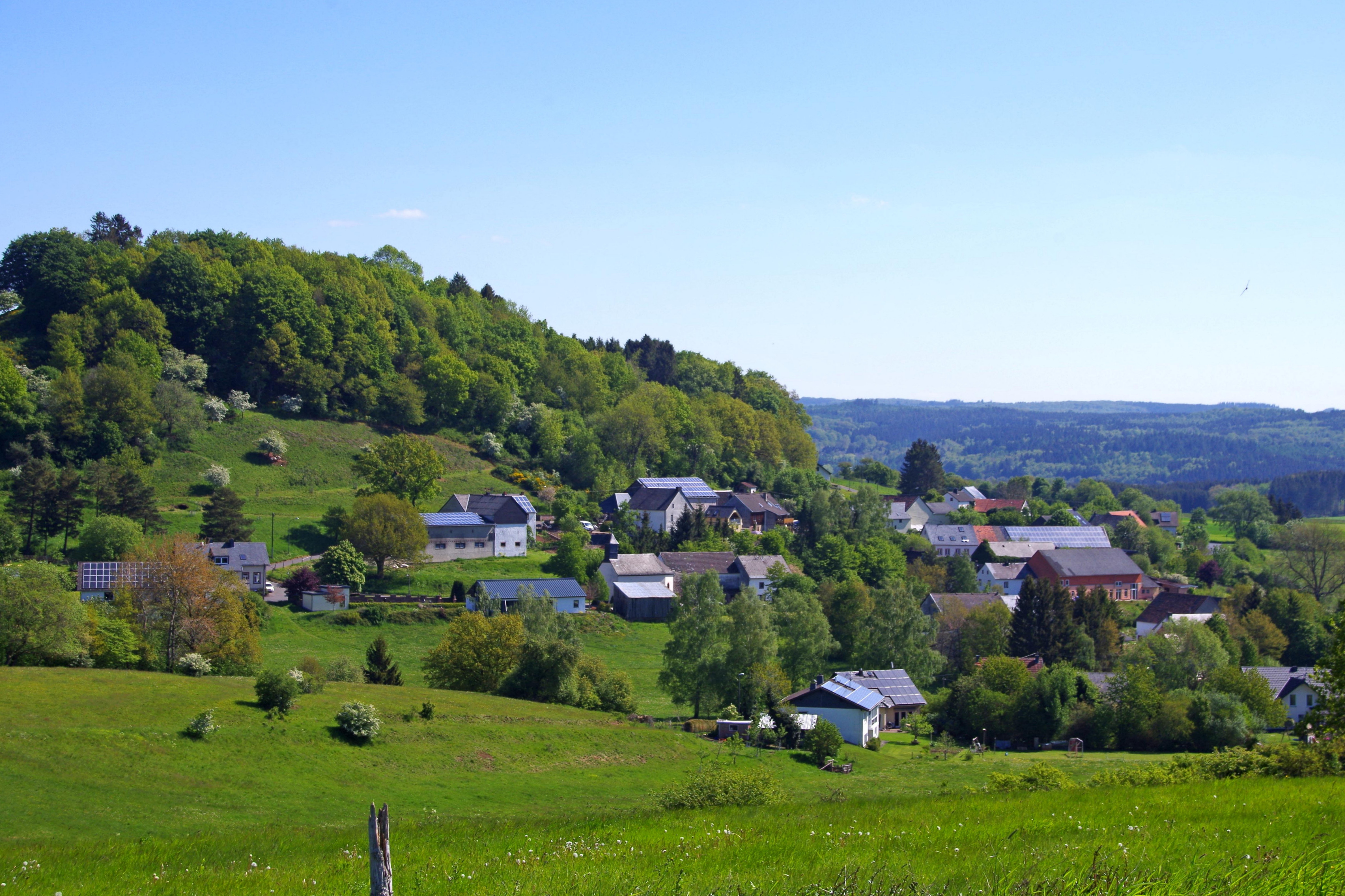 Basberg, Ansicht aus Südwesten